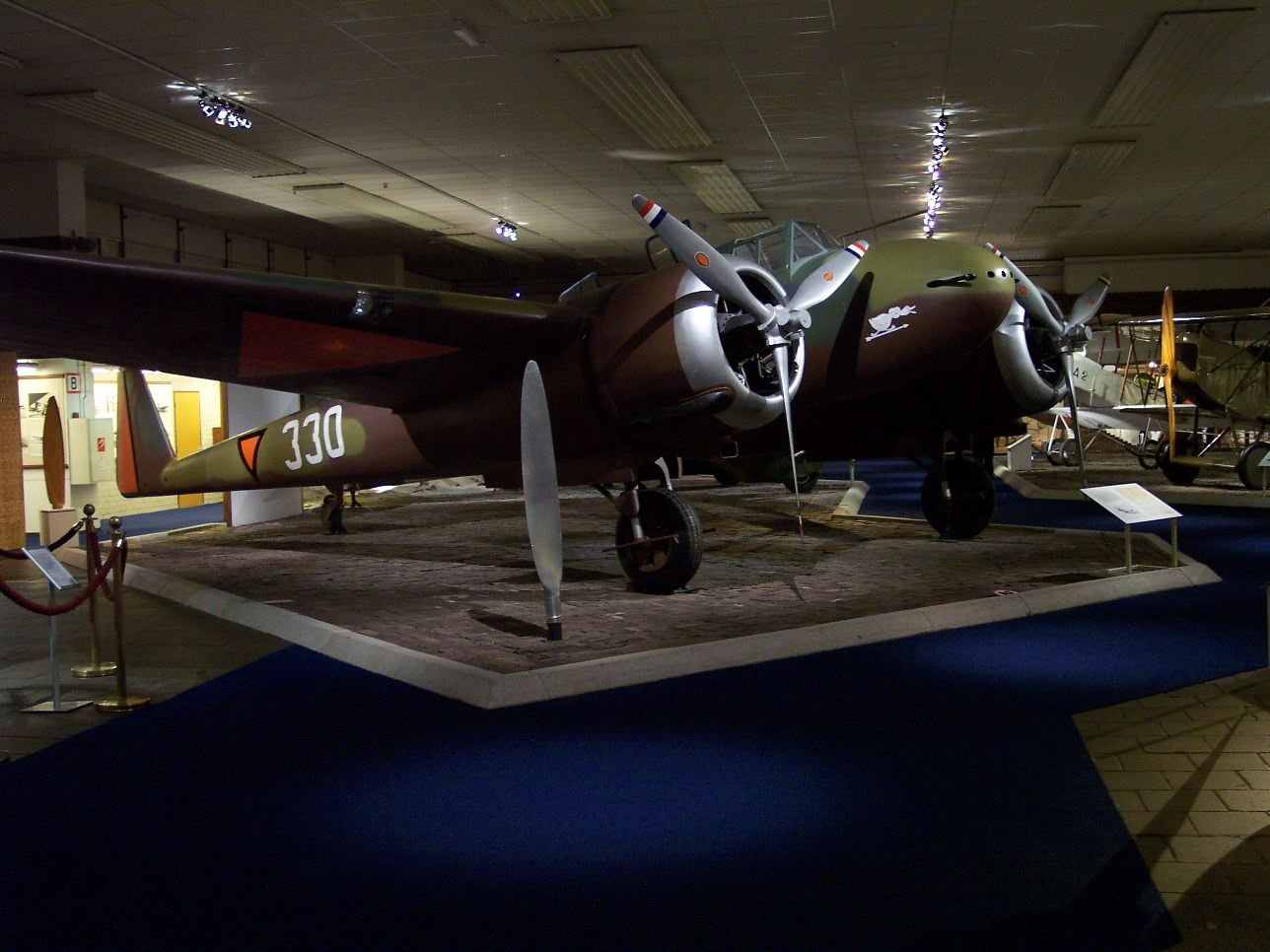 Fokker G.1A Replica in Soesterberg